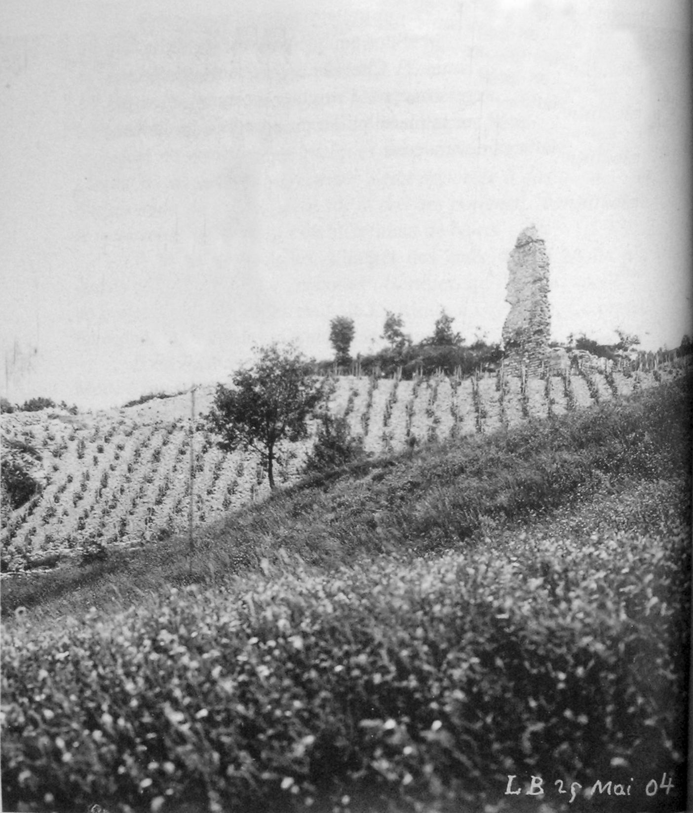 Chateau du Bas-Beaumont, Saint-Pierre-de-Méaroz (Isère, France), en 1904.